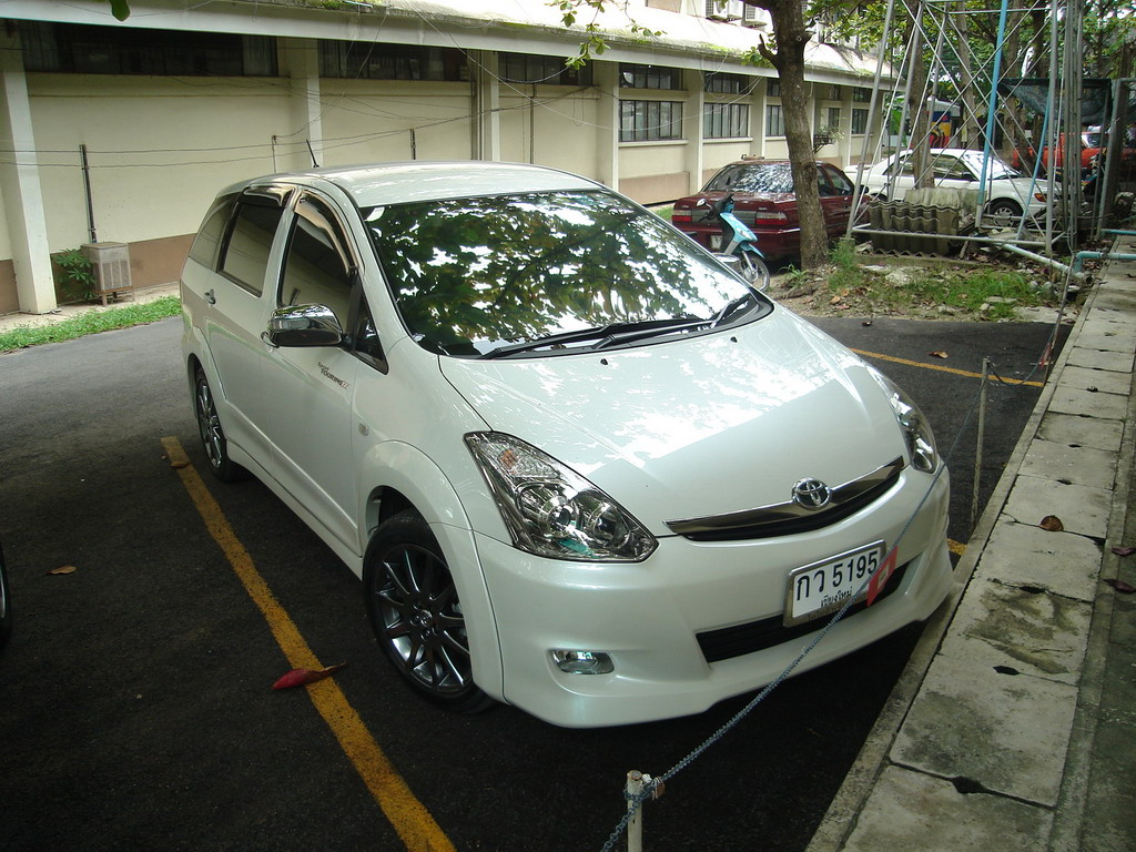 โตโยต้า วิช รุ่นที่ 1.